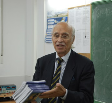 Antonio García-Trevijano